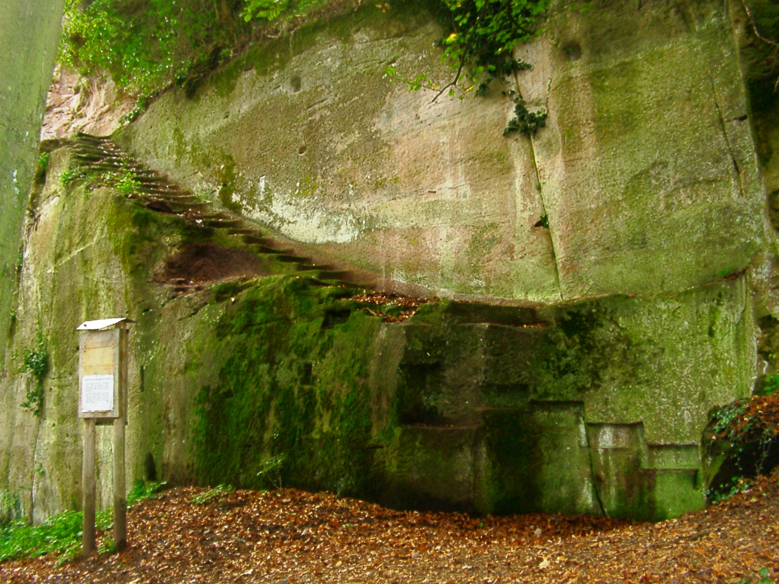 Treppen an der Burgruine Neukastel.